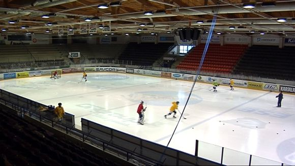 Kalevankankaan jäähalli Jukureiden harjoituksien aikaan.